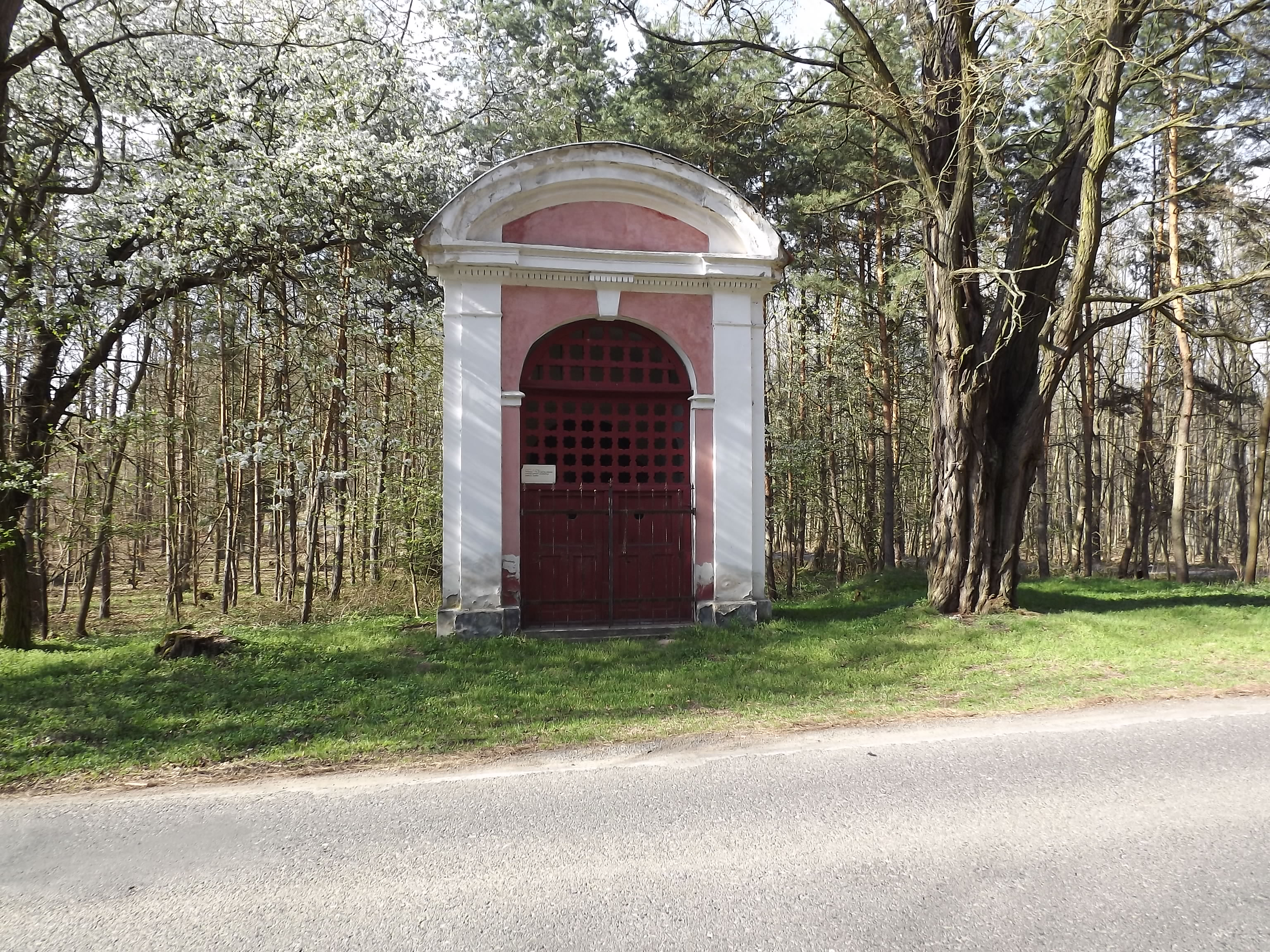 Kaplička svaté Anny, u silnice od Dobříše do Rosovic, Rosovice.